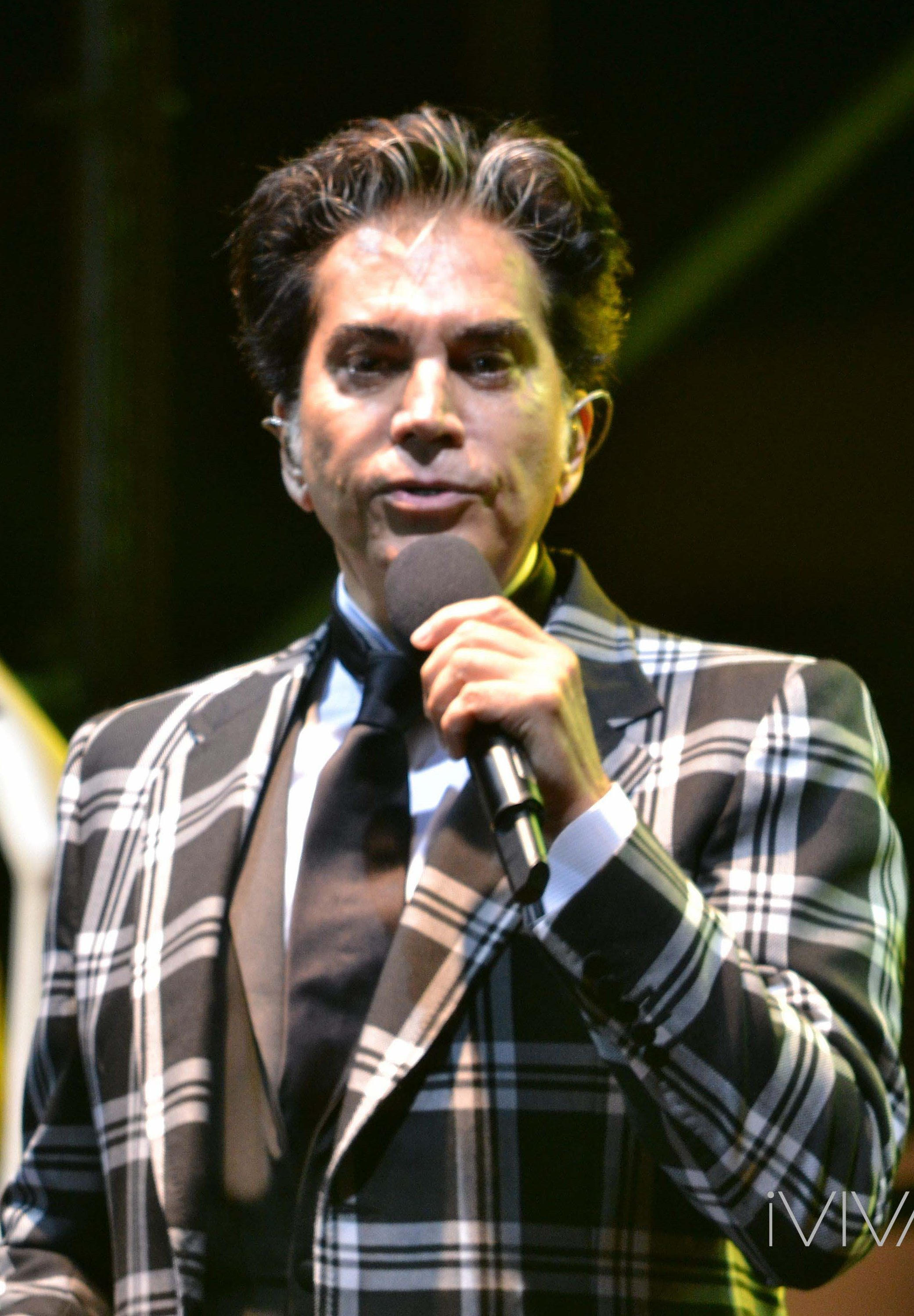 José Luis Rodríguez